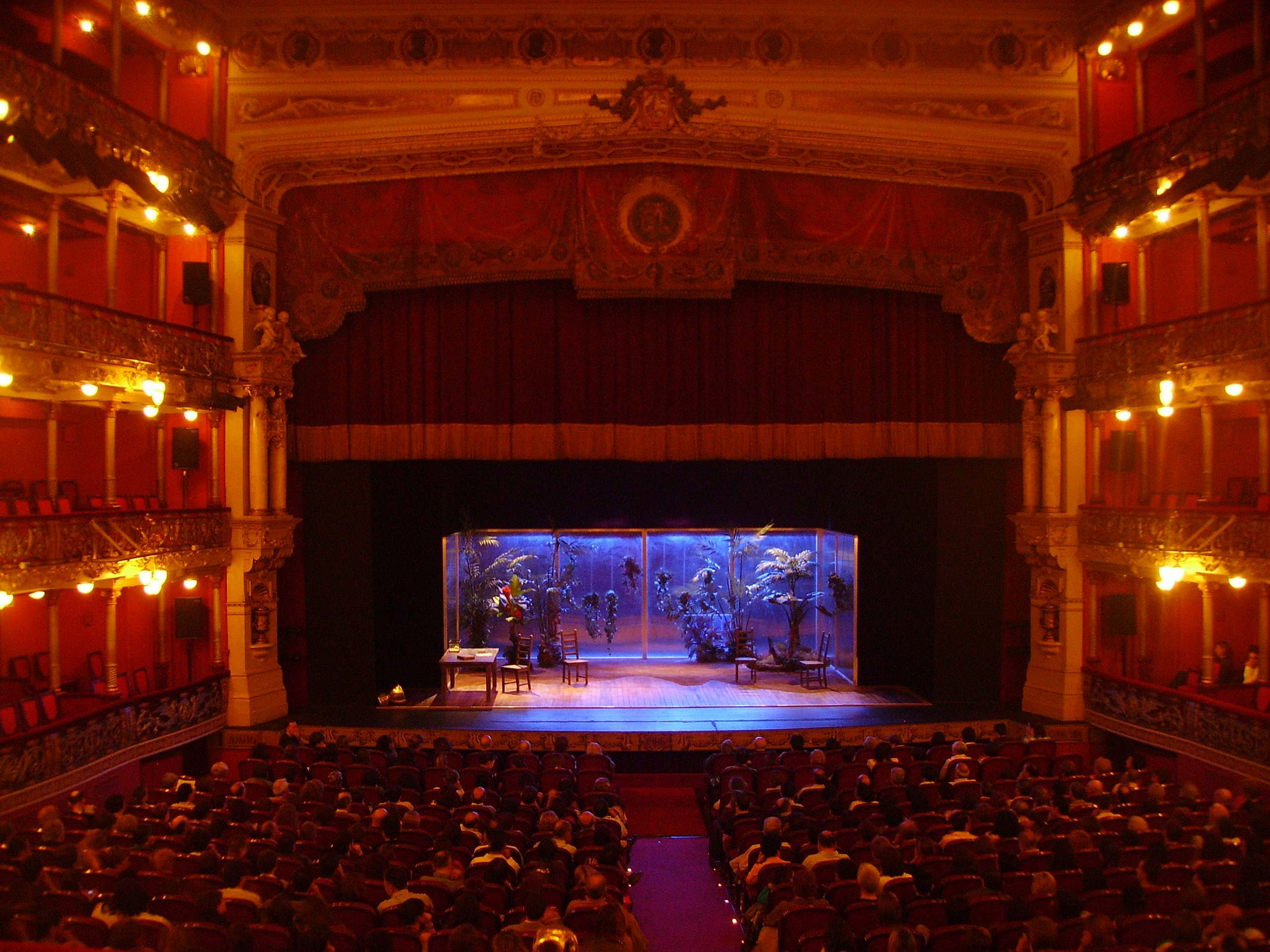 Bilboko Arriaga Antzokiaaren barnealdean, 2008an.